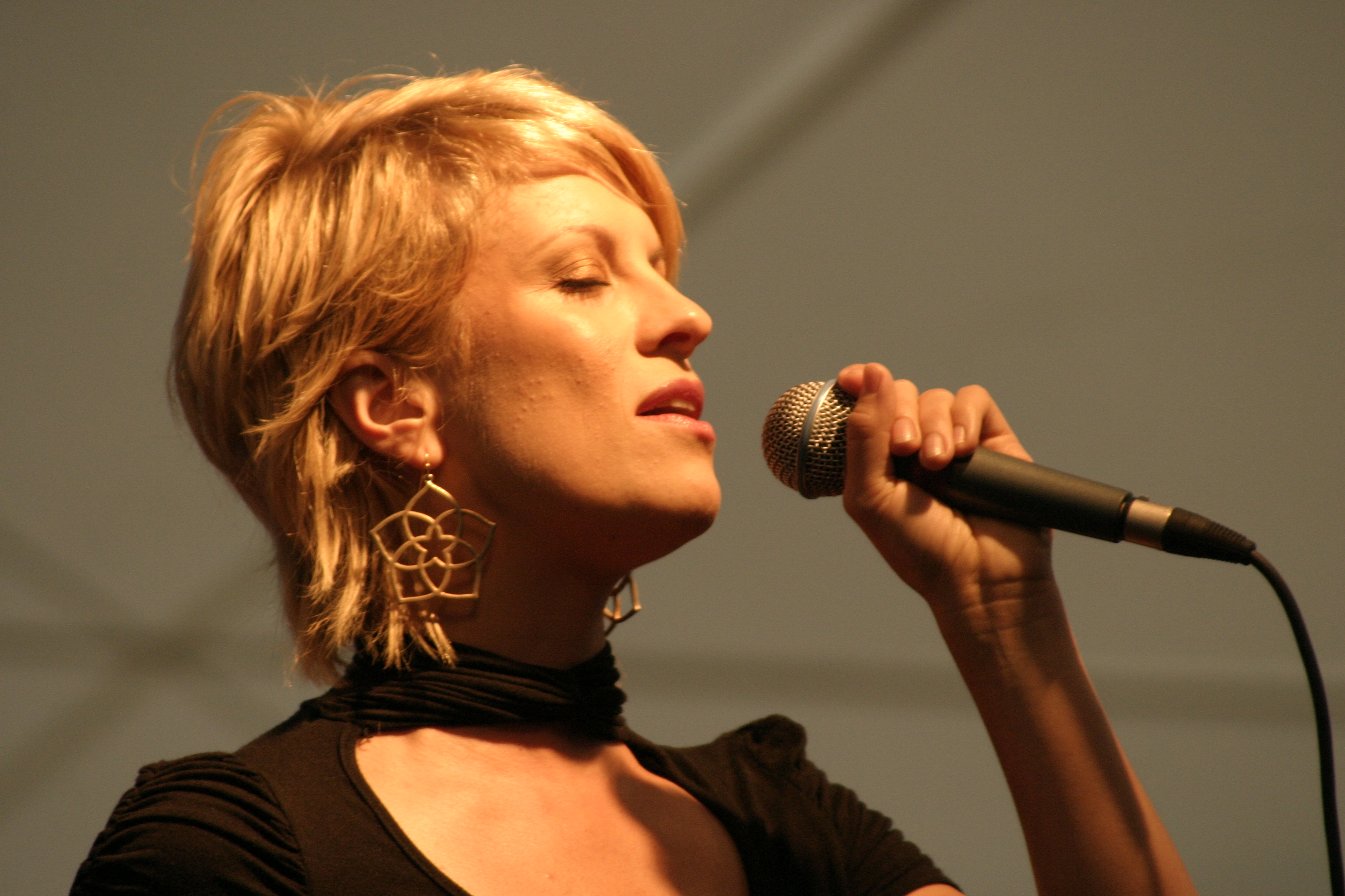 Laura Voutilainen Vihreillä Niityillä 2007